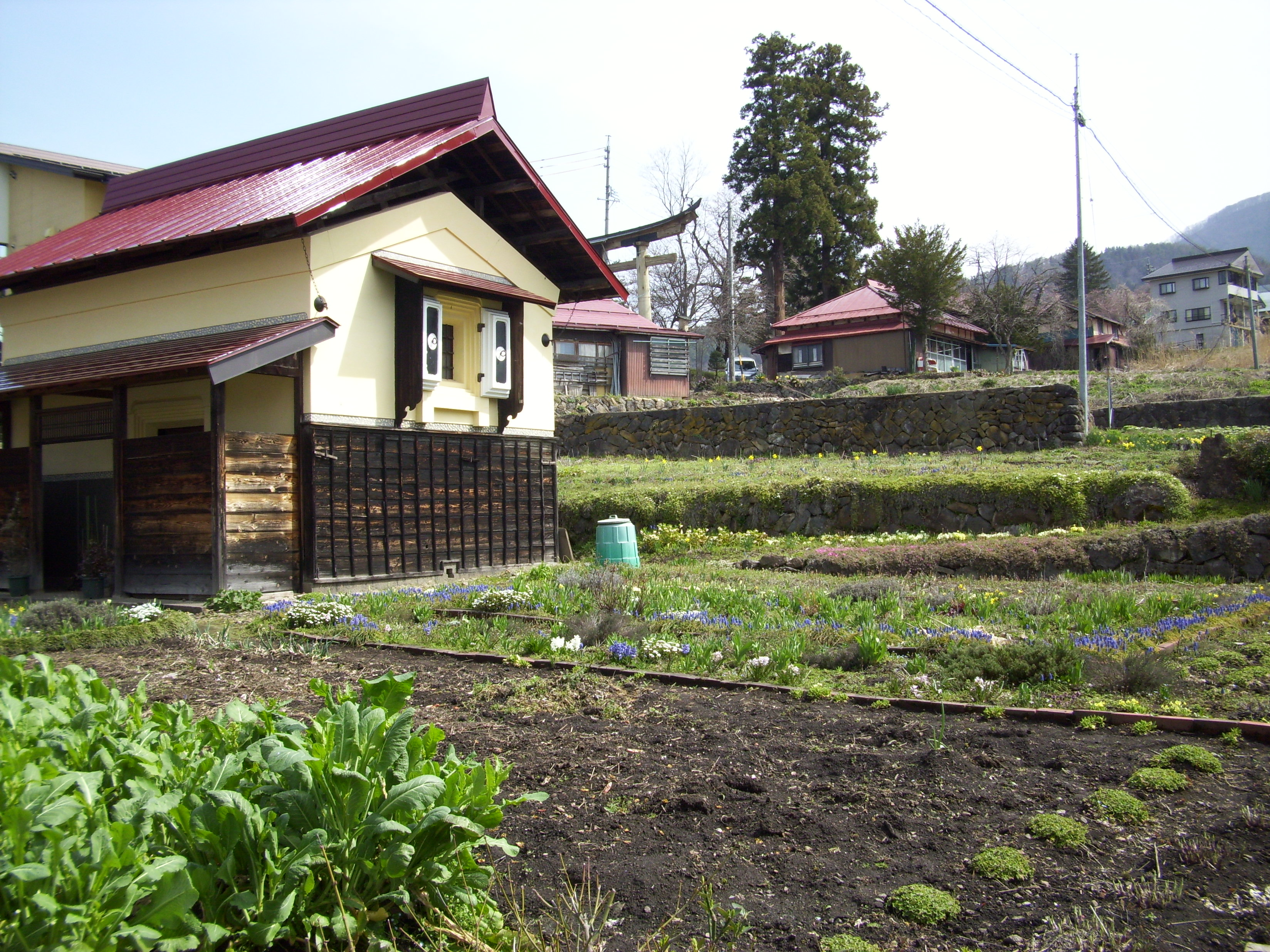 重要文化的景観「小菅の里および小菅山の文化的景観」：関沢地区